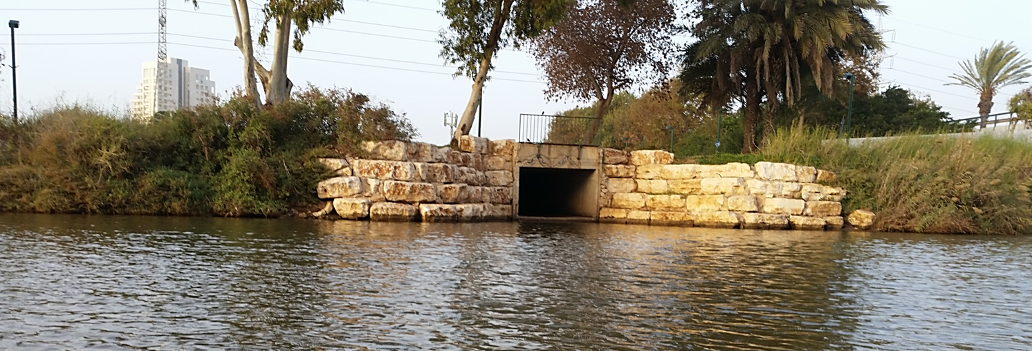 שפך נחל אחיה לירקון כיום